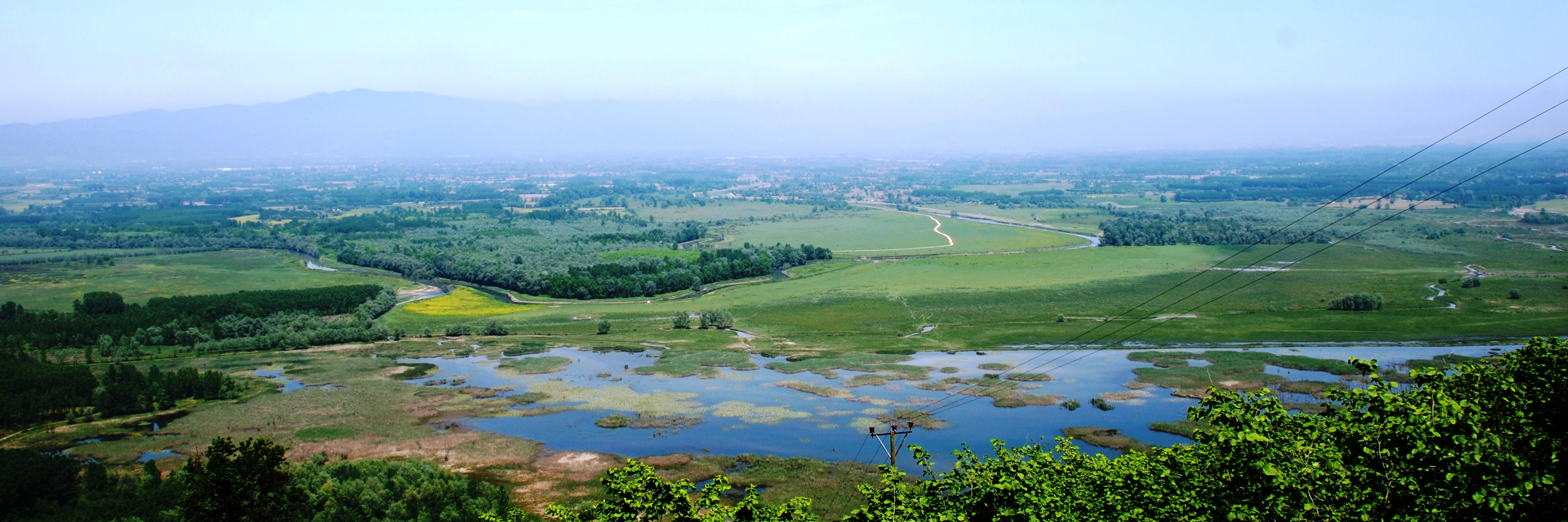 Efteni Gölü Yaban Hayatı Geliştirme Sahası, Gölyaka, Düzce